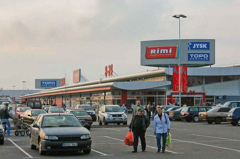 Rimi Hypermarket shopping center in Žirmūnai, Vilnius